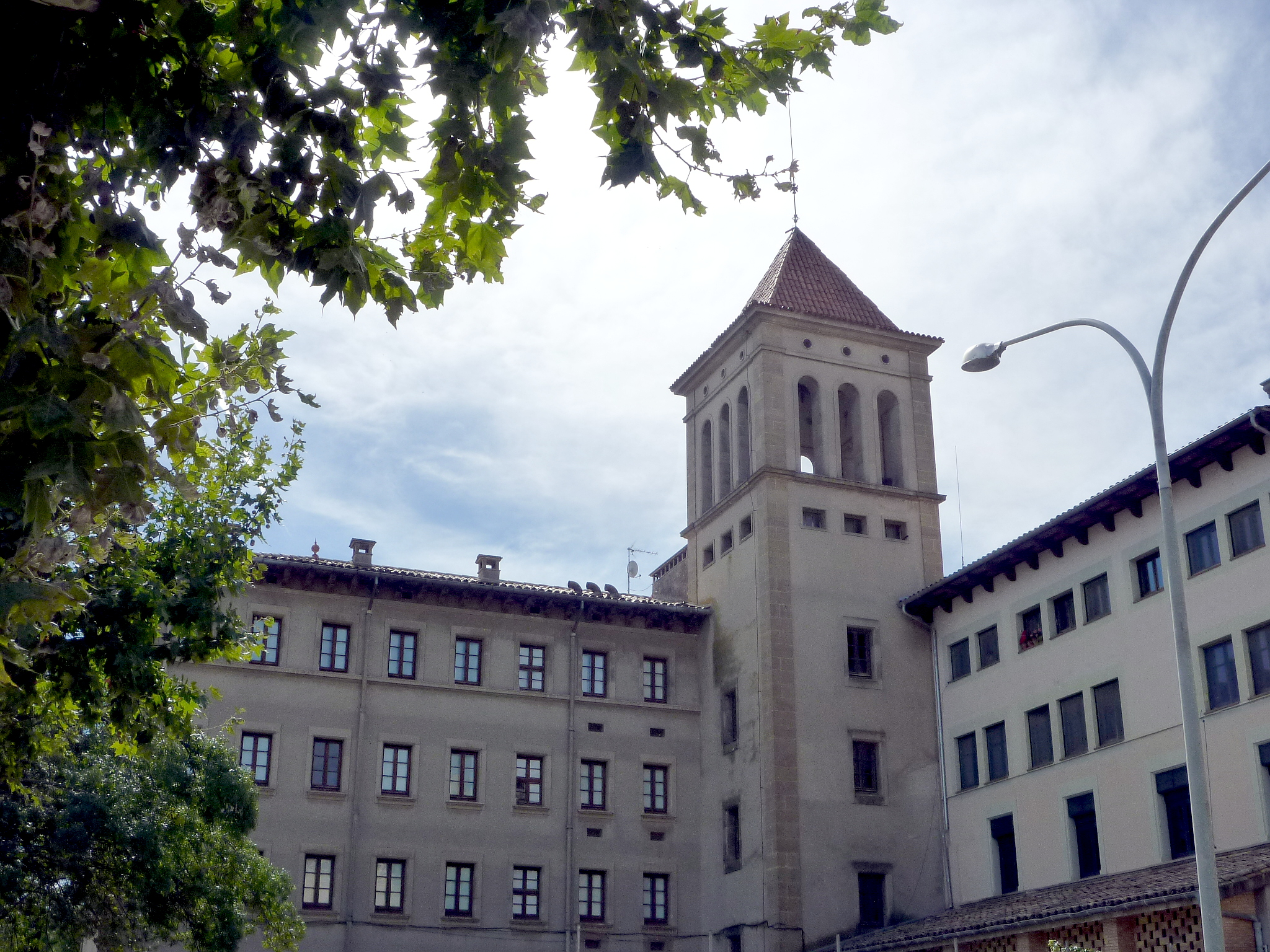 Seminari Diocesà (Solsona): Torre del Seminari major